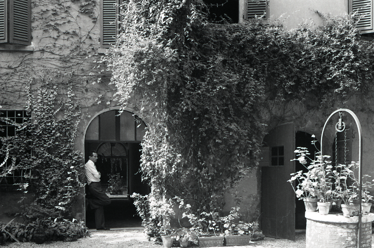 Ferrara. Centro storico. Edificio civile non identificato. Esterno: cortile con pozzo e piante rampicanti; capitelli. Servizio fotografico : Ferrara, 1974 / Paolo Monti. - Strisce: 5, Fotogrammi complessivi: 27 : Negativo b/n, gelatina bromuro d'argento/ pellicola ; 35 mm. - ((Sul portanegativi: N[I]K[MA]T Tri-X. - Occasione: Documentazione del centro storico. - Fonte: Agenda di Paolo Monti: Leica 1501-3000 Controllo numerazione (1950-1978), presso Archivio Paolo Monti. - Fonte: Fattura di Paolo Monti: IV. Commesse/ Fattura n. 18/ Riprese fotografiche del centro storico (Mostra Vitalità del centro storico) (1974/10/16), presso Archivio Paolo Monti